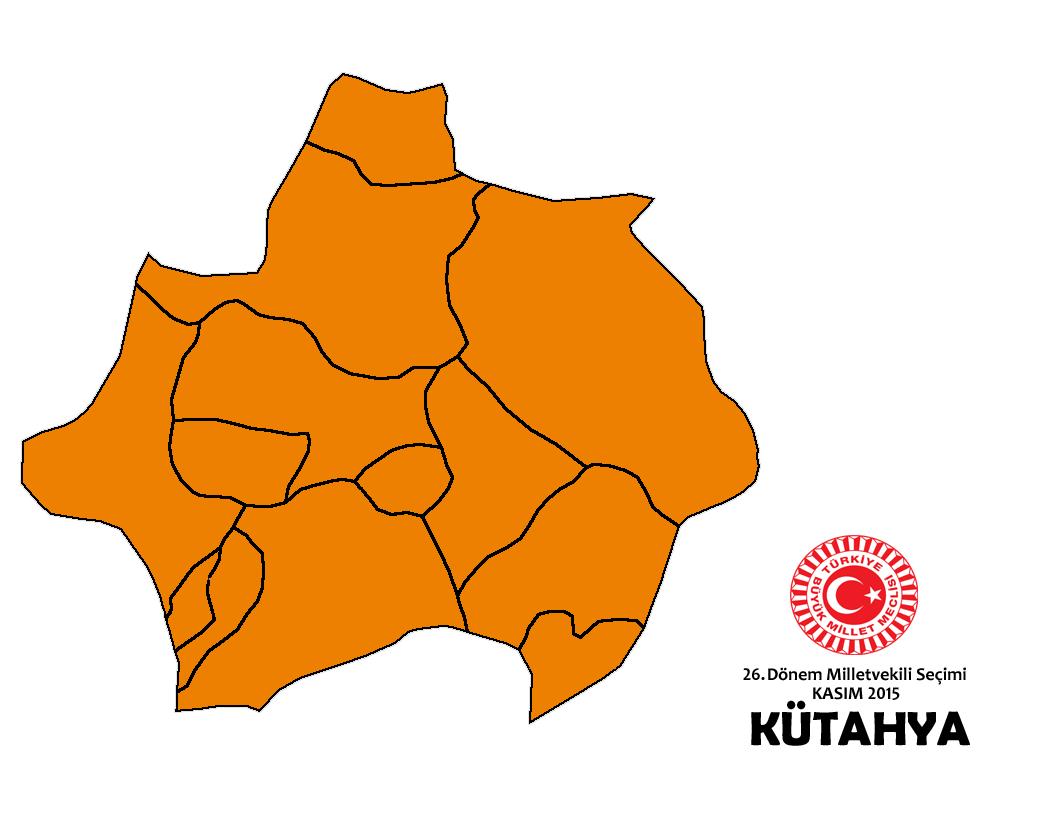 Kasım 2015 Seçimleri